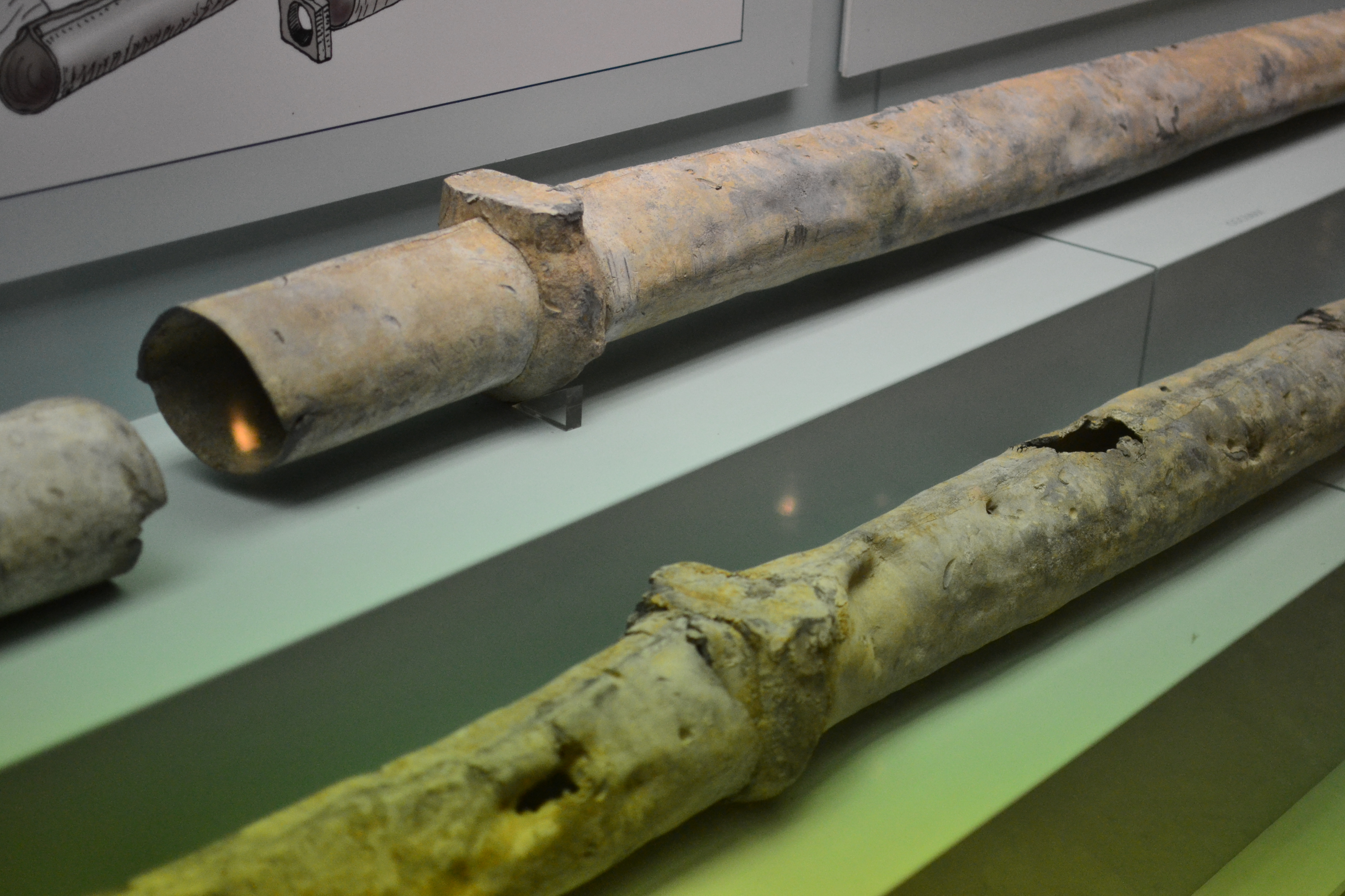 Tuberias romanas de plomo para la conducción de agua a una fuente del foro de Caesaraugusta. Museo del Foro de Caesaraugusta.